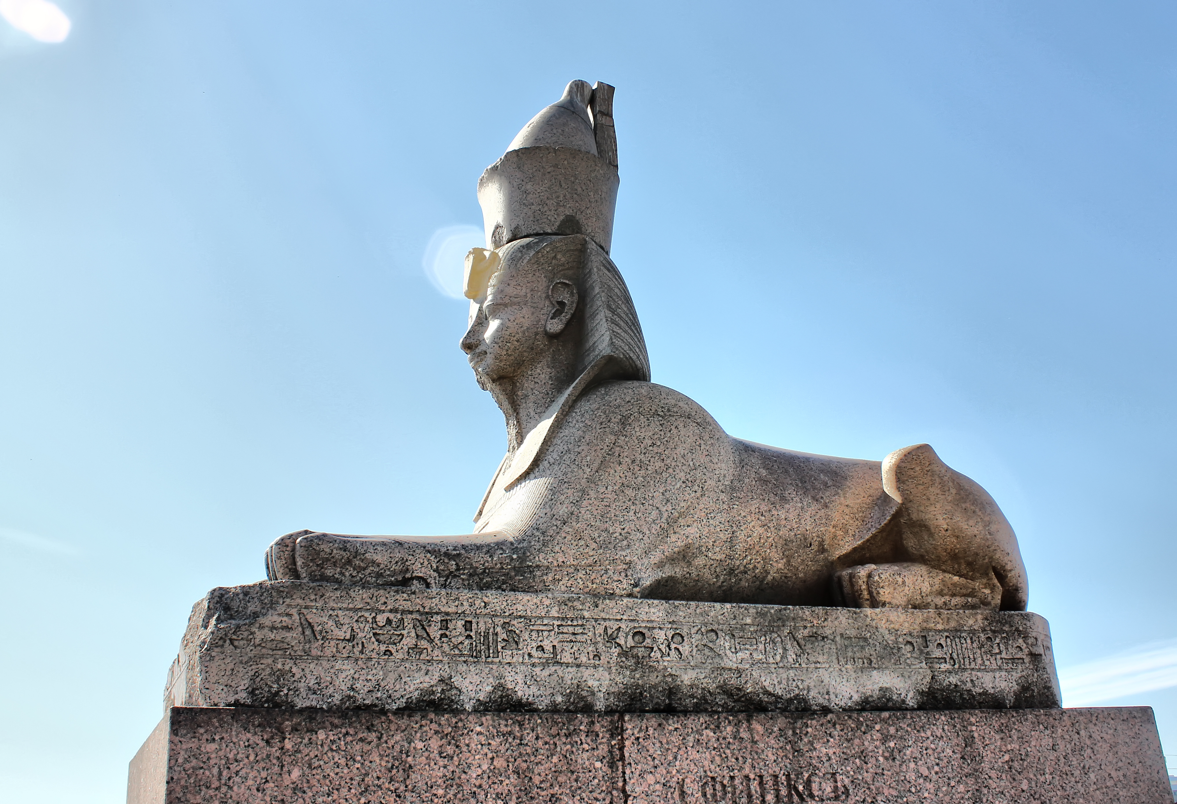 Vasileostrovsky District, St Petersburg, Russia